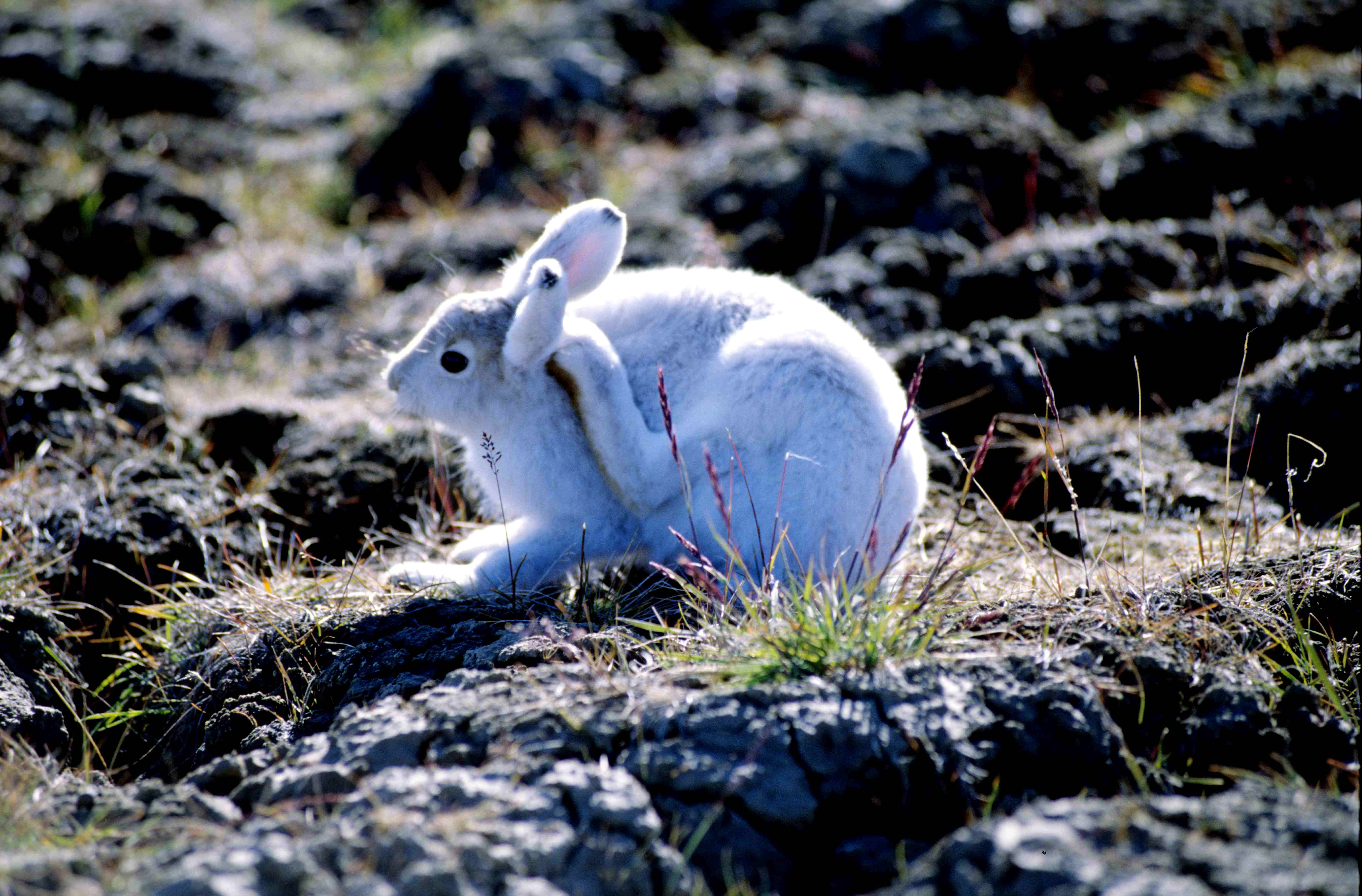 Arctic Hare (Ellesmere Island, Nunavut, Canada)